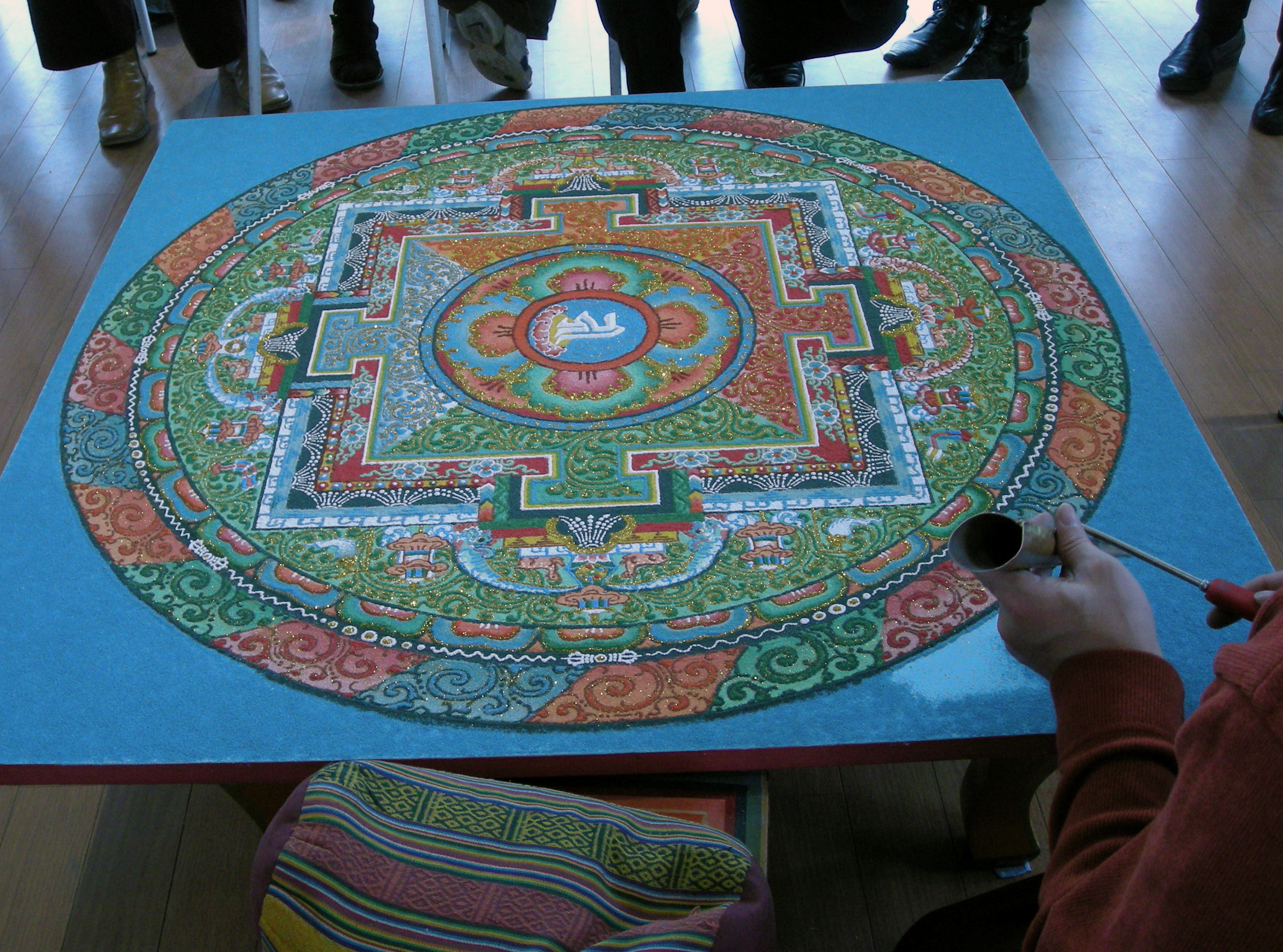 Troisième jour (derniers gestes) de la réalisation d'un mandala de sable "Pour la paix dans le monde", par trois lamas du temple des Mille Bouddhas, à la Tour de la Liberté de Saint-Dié-des-Vosges, les 11, 12 et 13 avril 2008